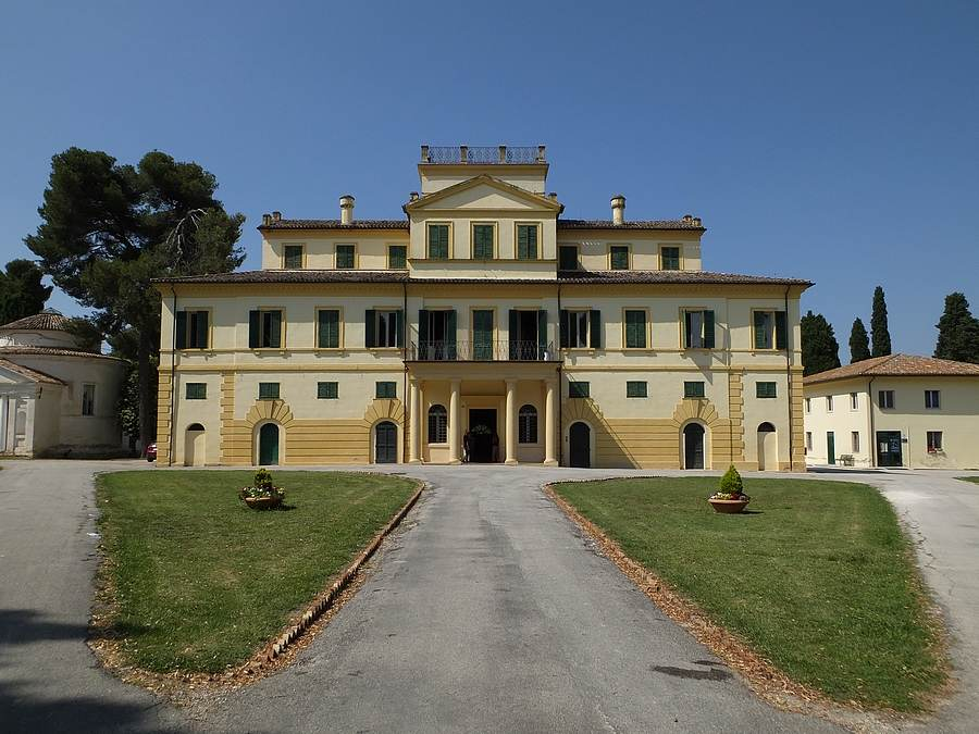 Villa Salvati a maggio